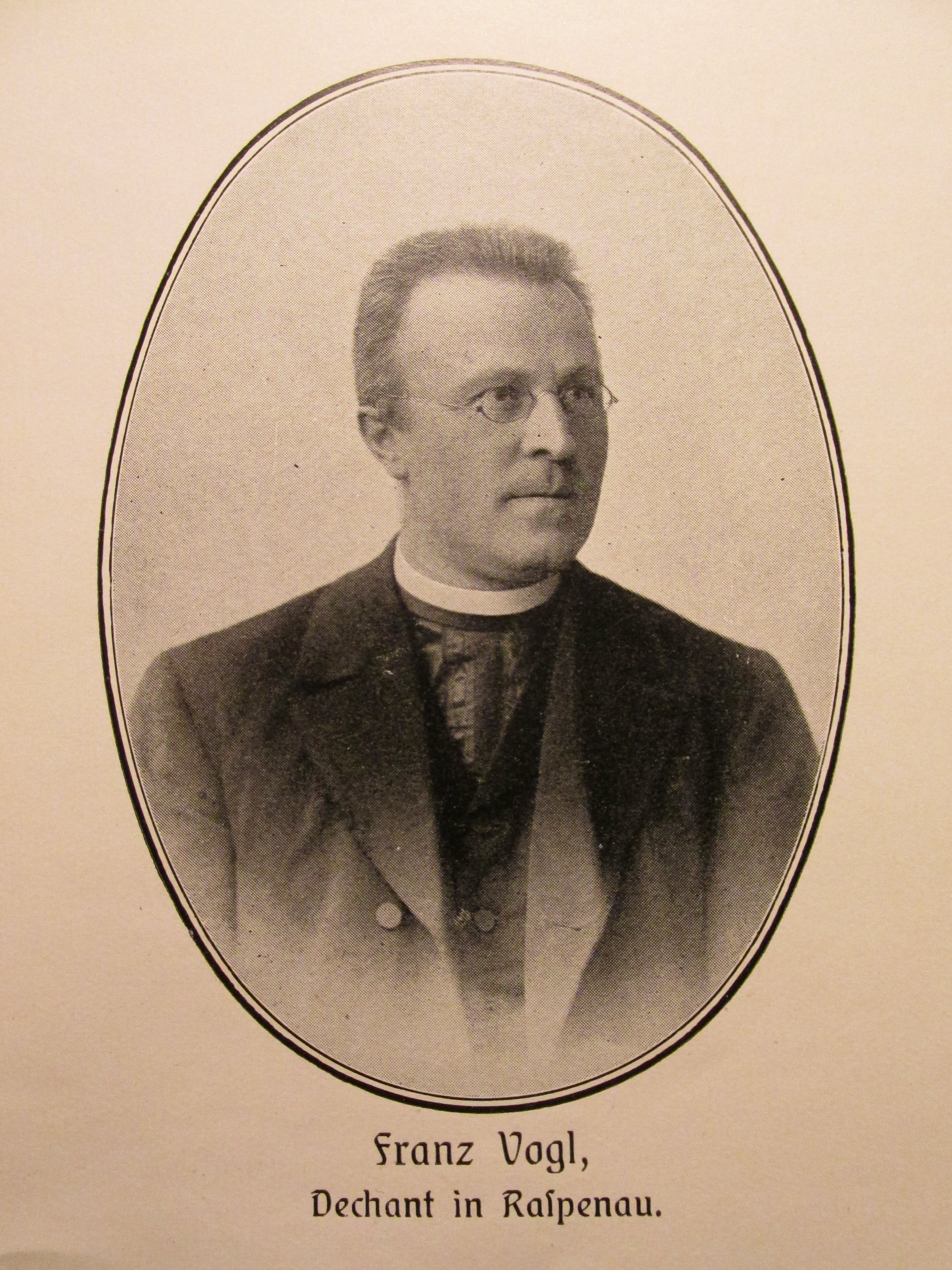 P. Franz Vogl – konzistorní rada a děkan; * 10. 10. 1860 v Einsiedlu; gymnaziální studia absolvoval v Bohosudově filosoficko - teologická studia absolvoval v Litoměřicích ord. 1884; farář a okrskový vikář v Raspenavě; zakladatel: Pfarrgruppe zum heiligen Geiste der katholischen Schulvereines in Reinowitz